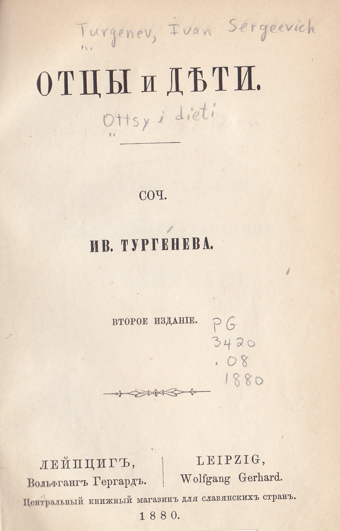 Титульный лист второго издания (Лейпциг, Германия, 1880)